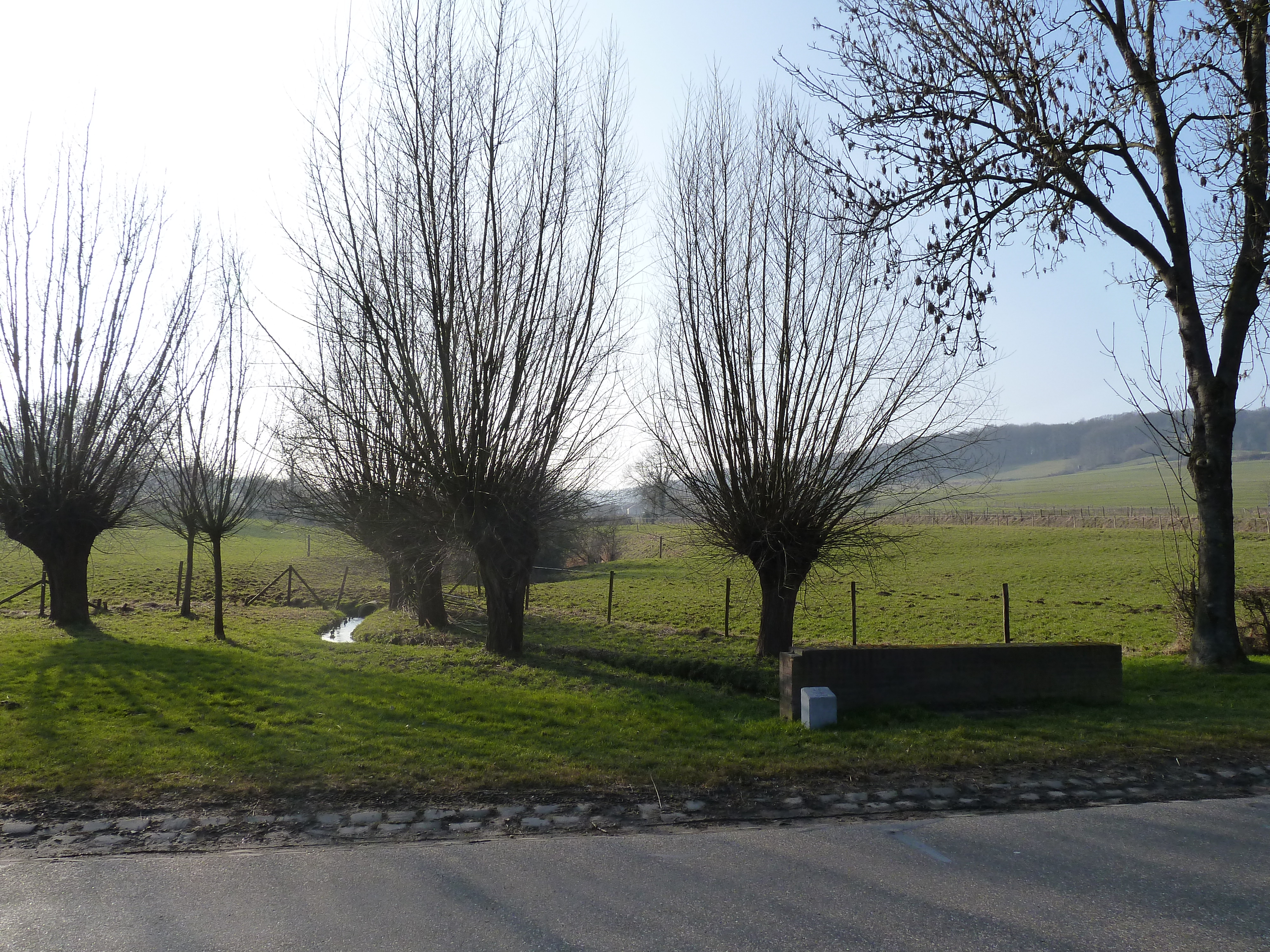 Landeus bij Mechelen, Gulpen-Wittem, Limburg, Nederland